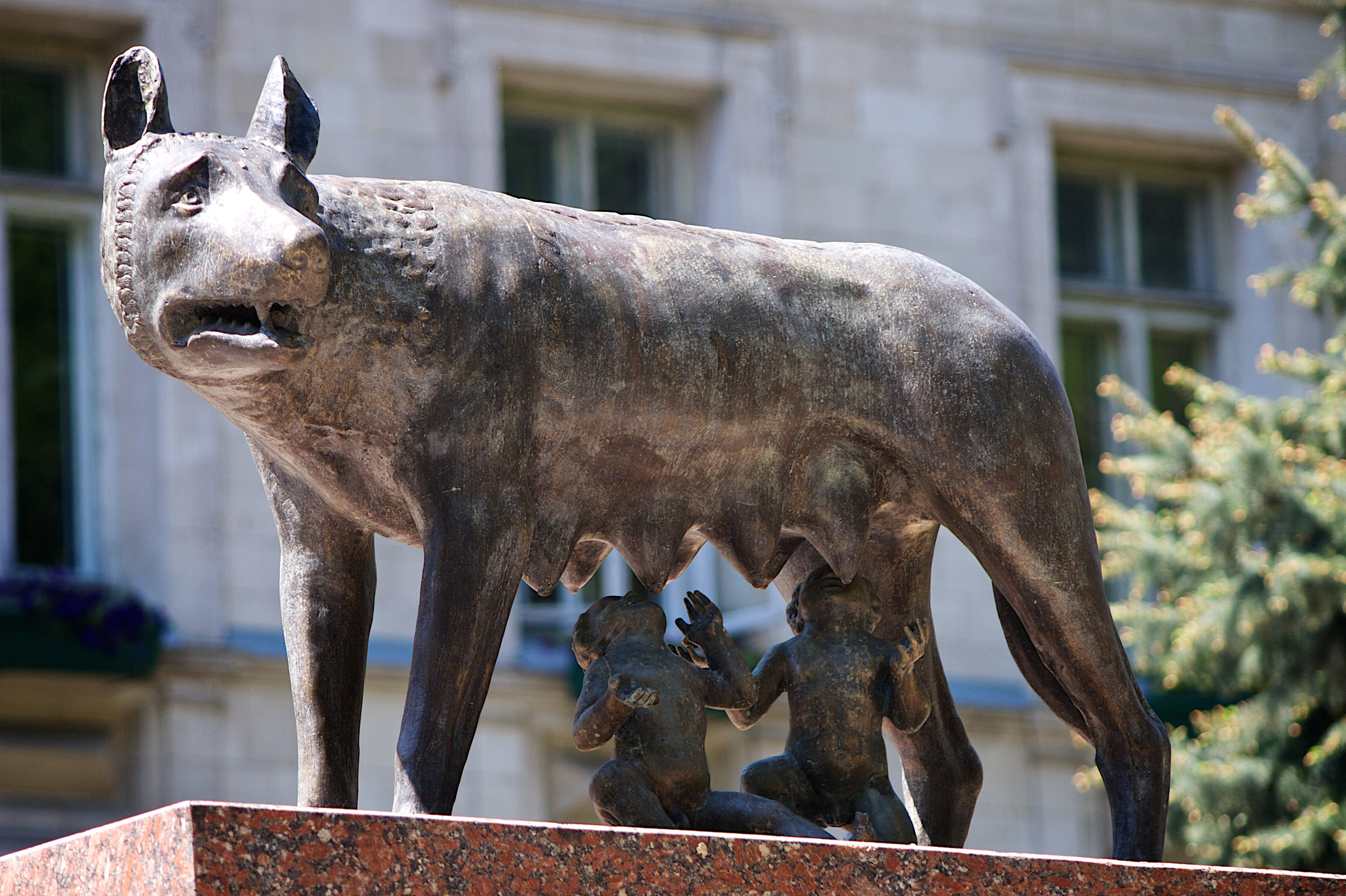 Chișinău